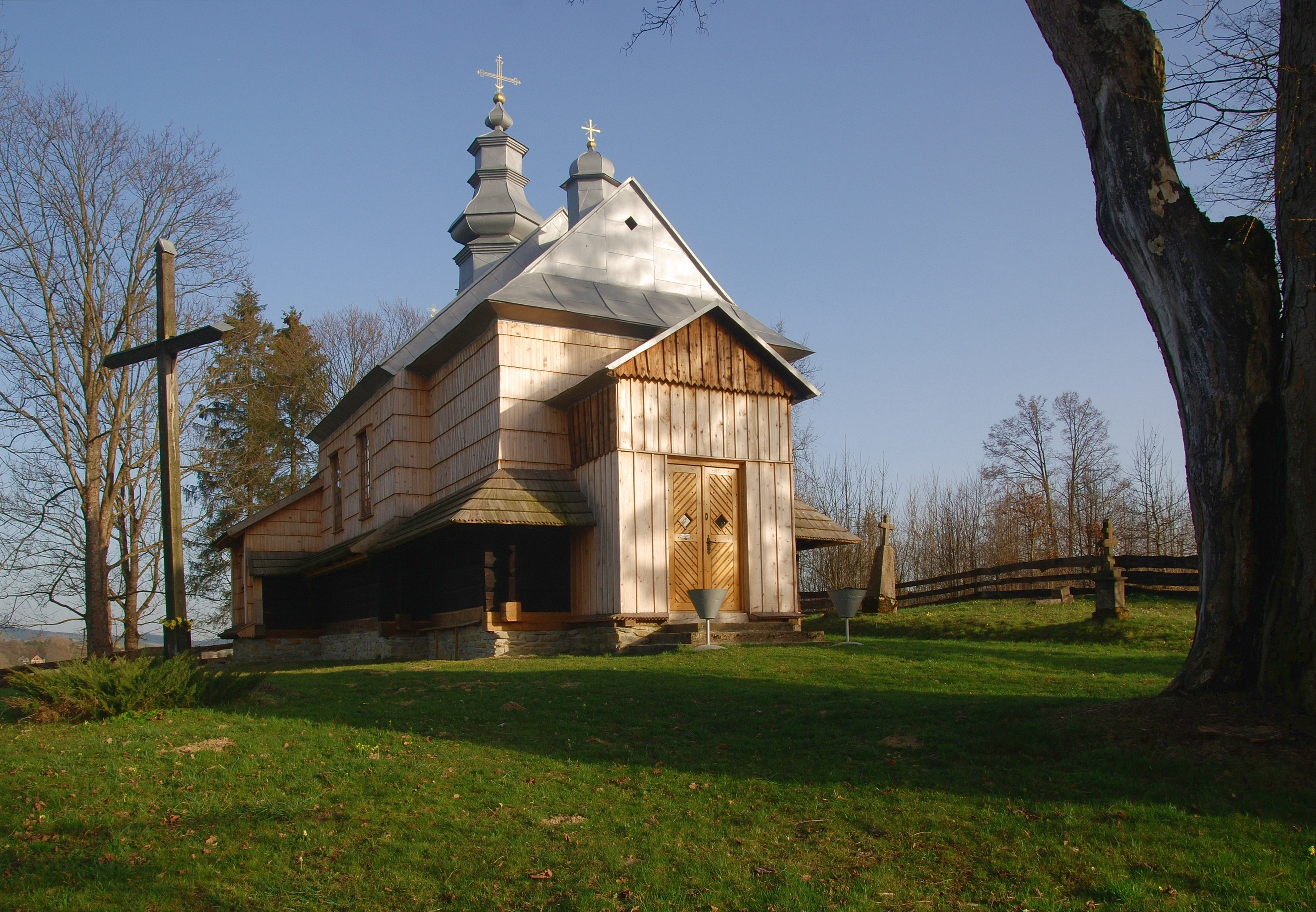 wieś Jałowe